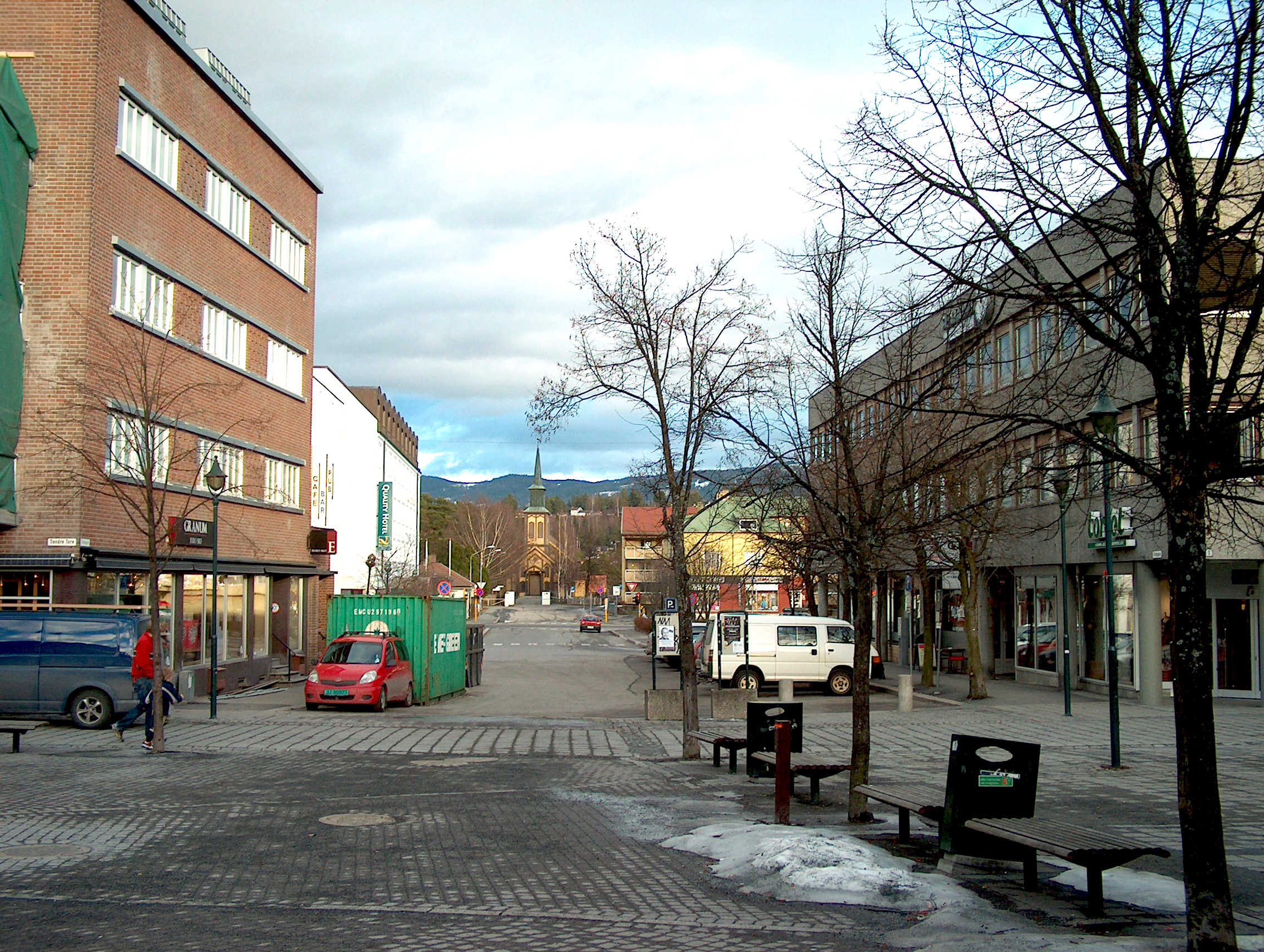 Kirkegata i Hønefoss (Norway)